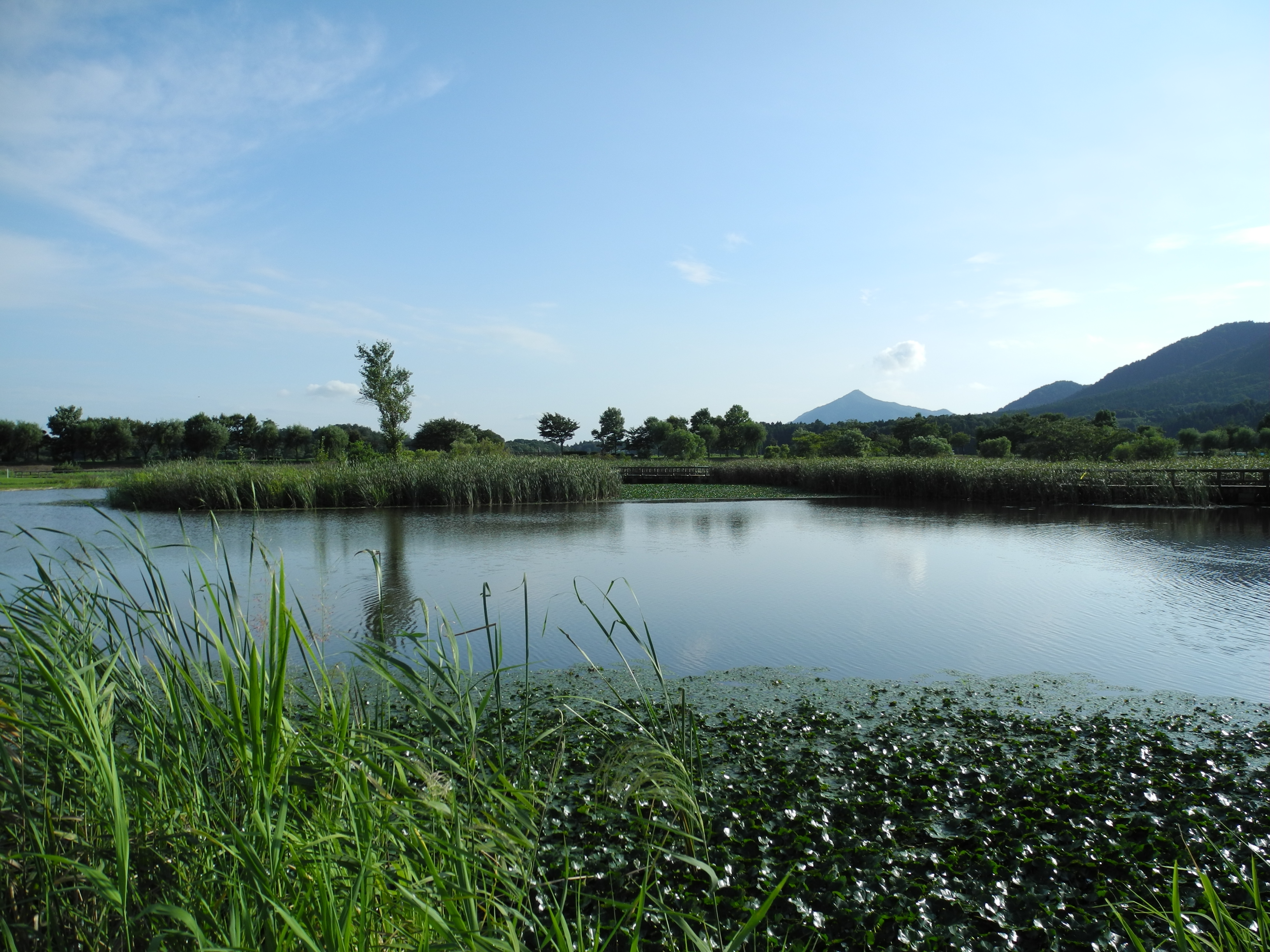 初秋の上堰潟 新潟市西蒲区 2013年9月6日撮影